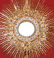 voor box uitsnede monstrans